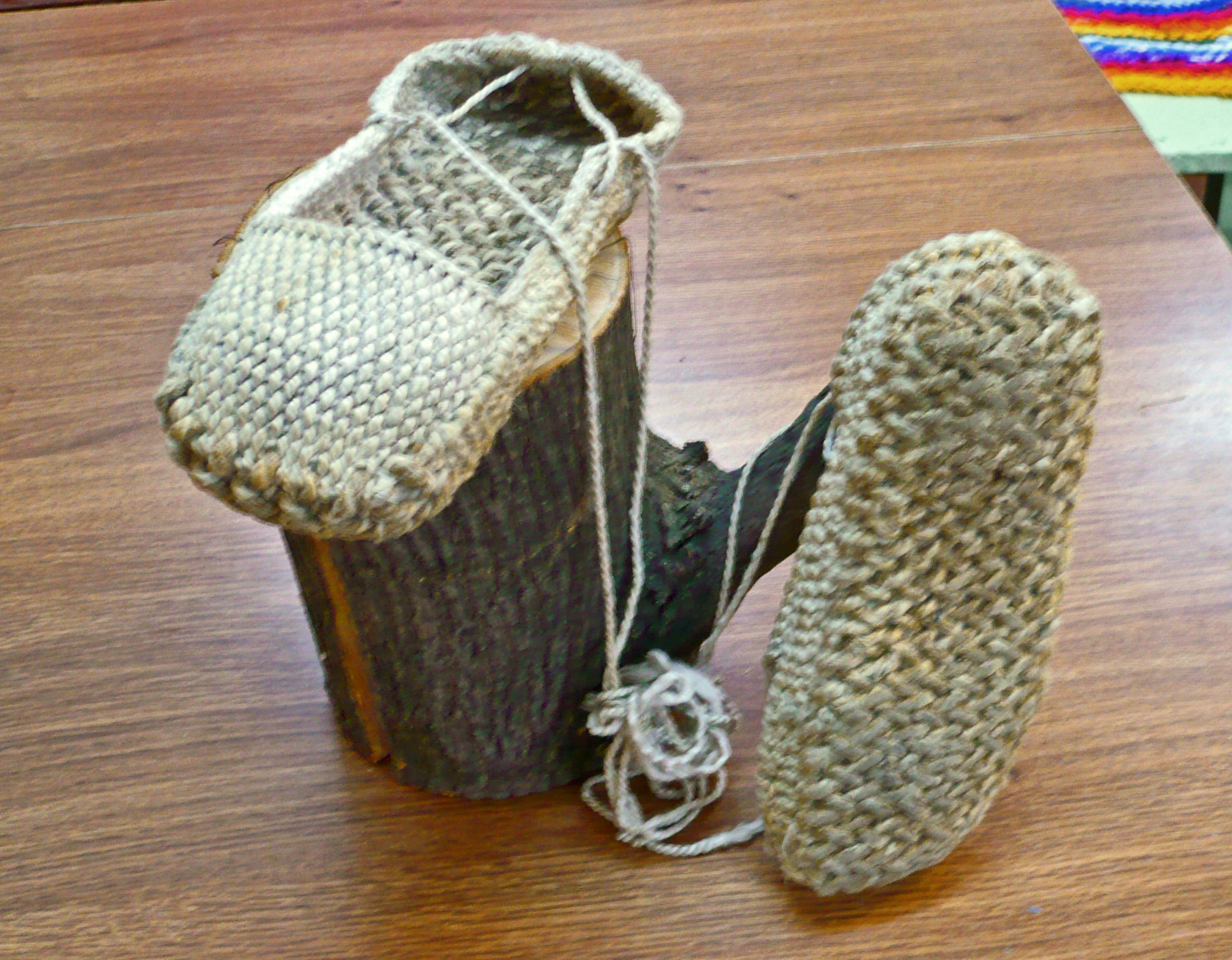 Чуни — лапти из верёвок (аналог пеньковых). Дом ремесел, г. Старый Оскол. 2008.